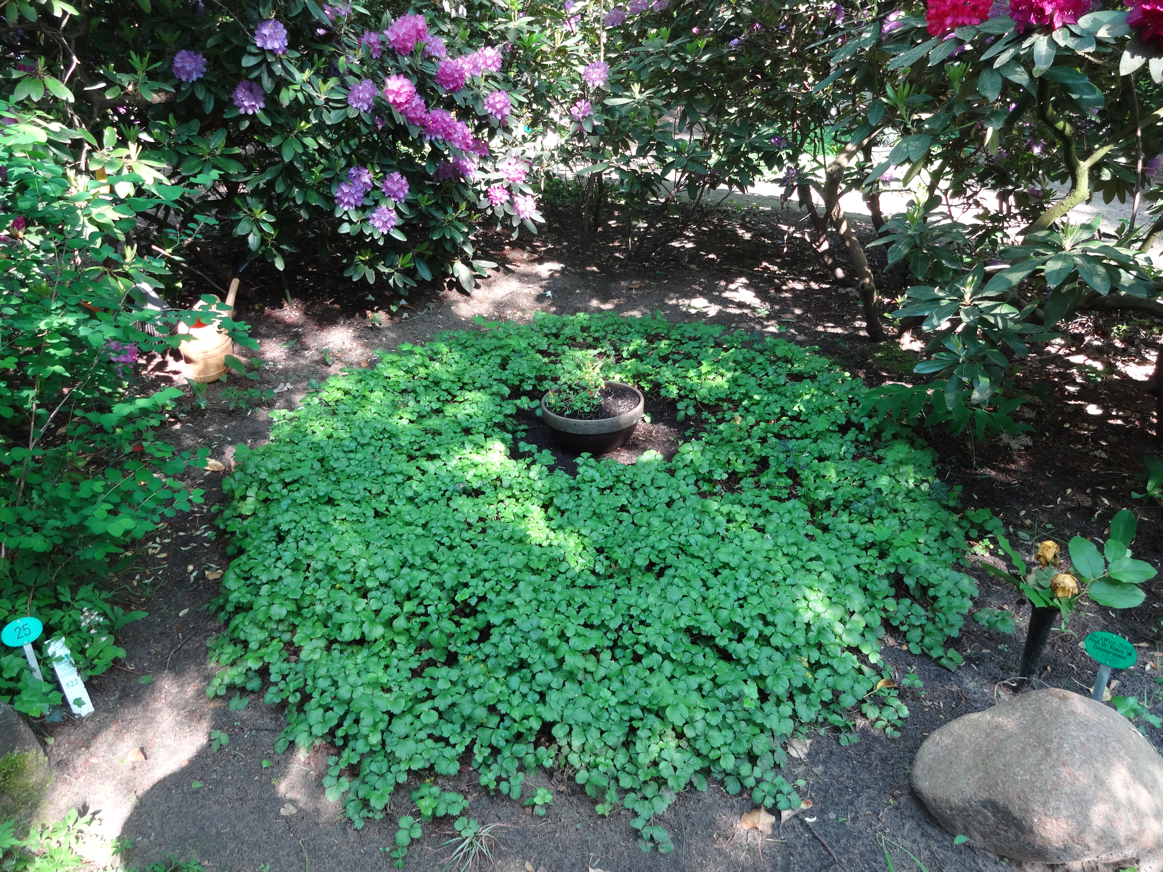 Grab des Ökonomen Prof. Klaus W. Zimmermann auf dem Friedhof Heerstraße in Berlin